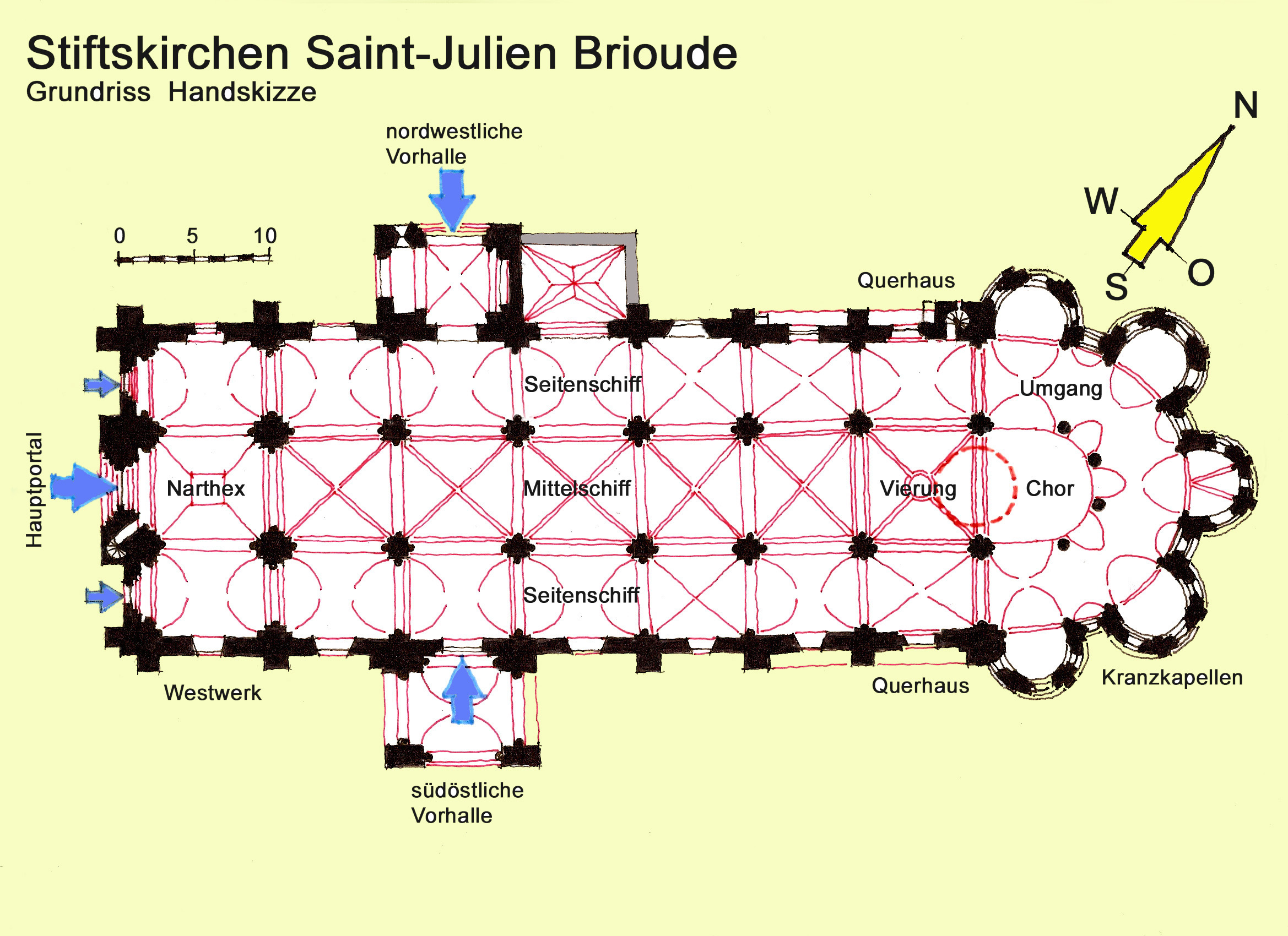 St.-Julien_Brioude,_Grundriss, Handskizze